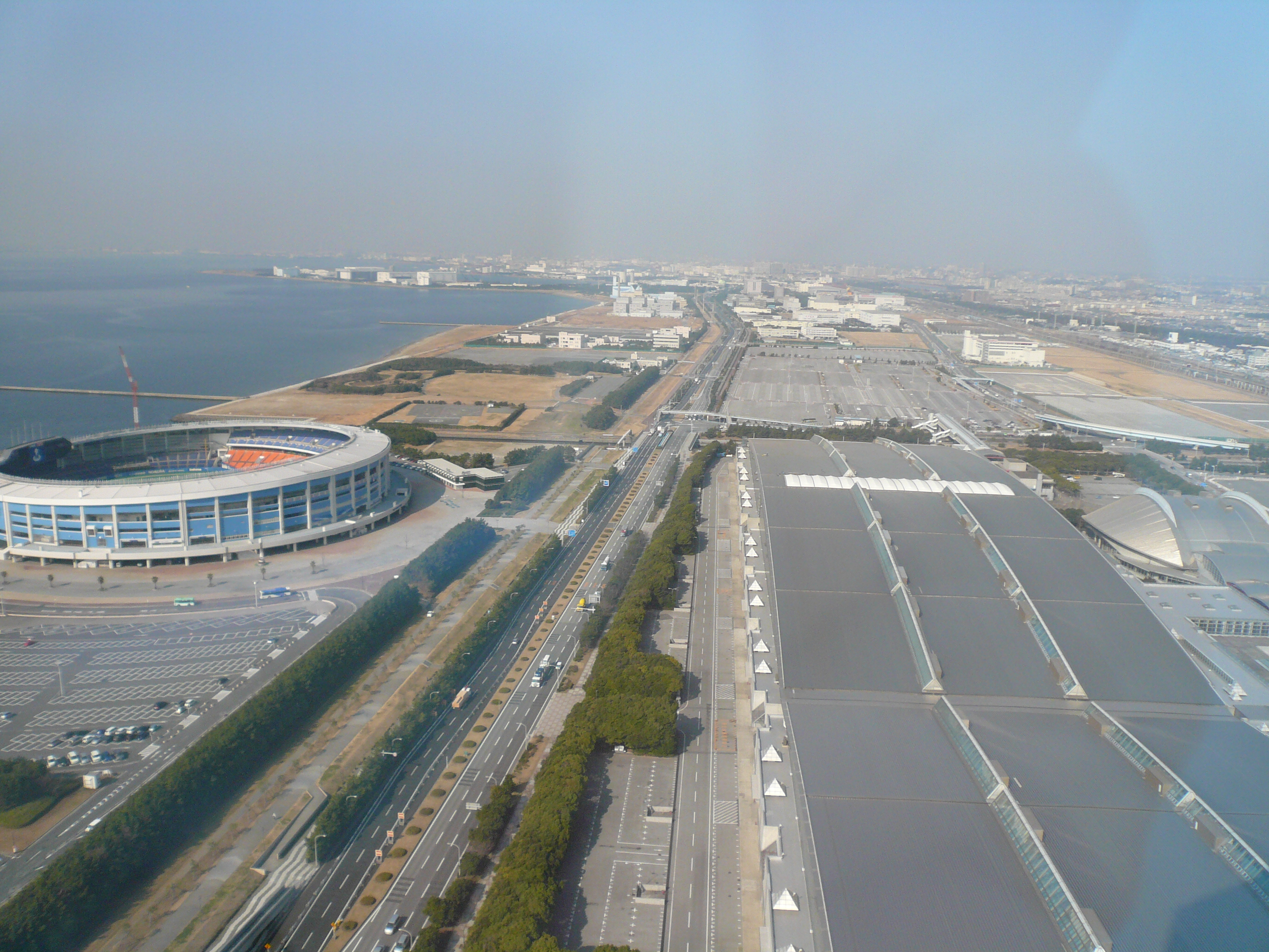 Makuhari Messe & Bay Stadium (幕張メッセとベイスタジアム)